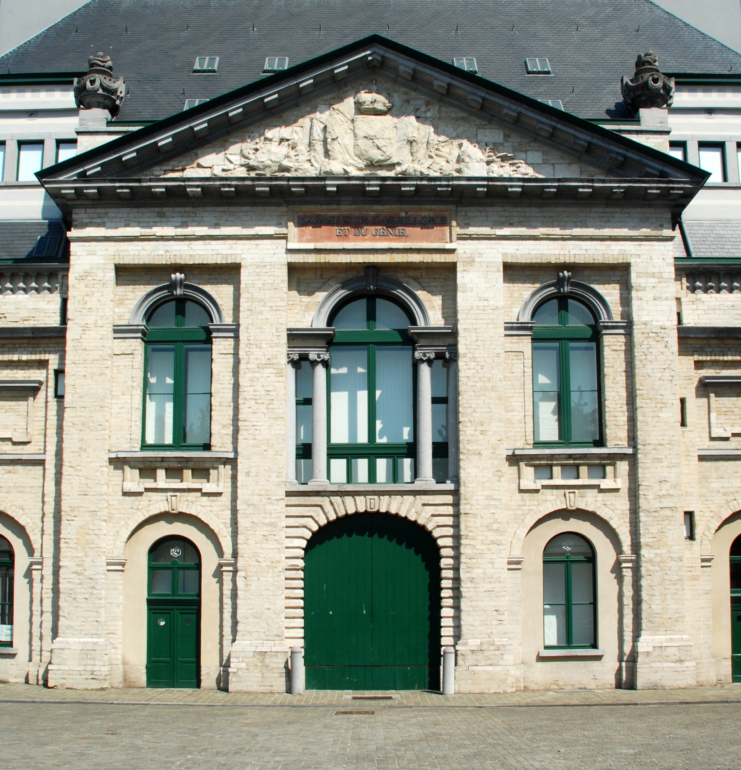 Belgique - Bruxelles - Ancien arsenal (néoclassique, architecte Rémy Nivoy, 1780-1781)